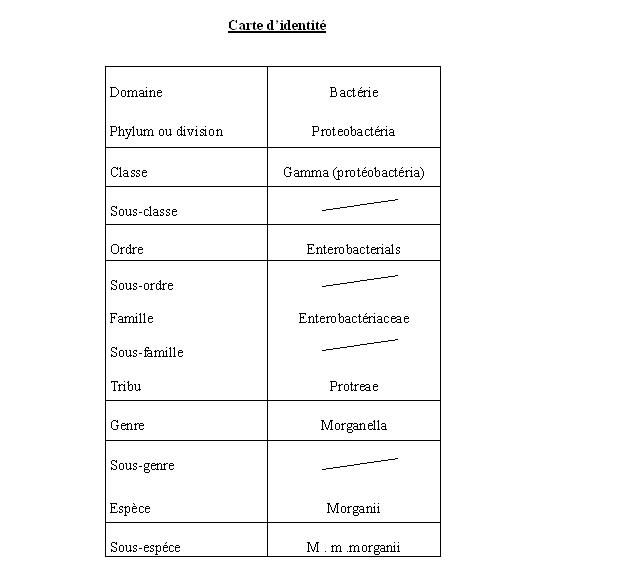 carte d'identité bactérie